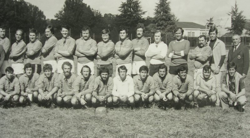 USFL Années 80